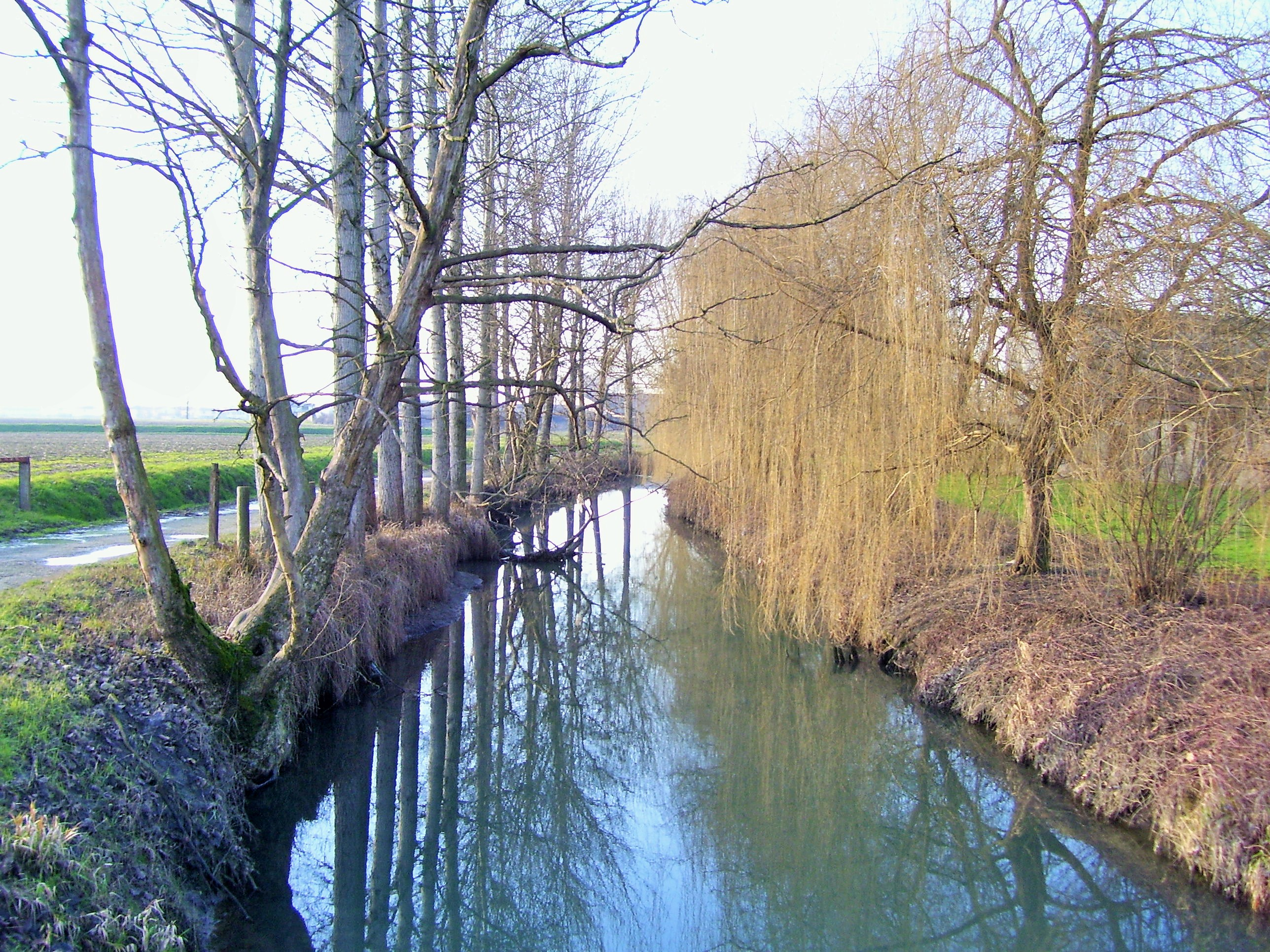 Brembio. Il Brembiolo a monte del ponte del Monasterolo.